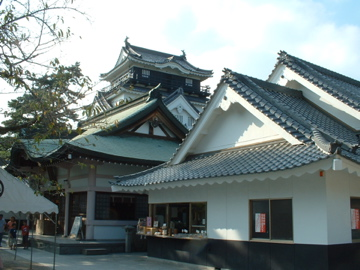 Okazaki Castle in Okazaki